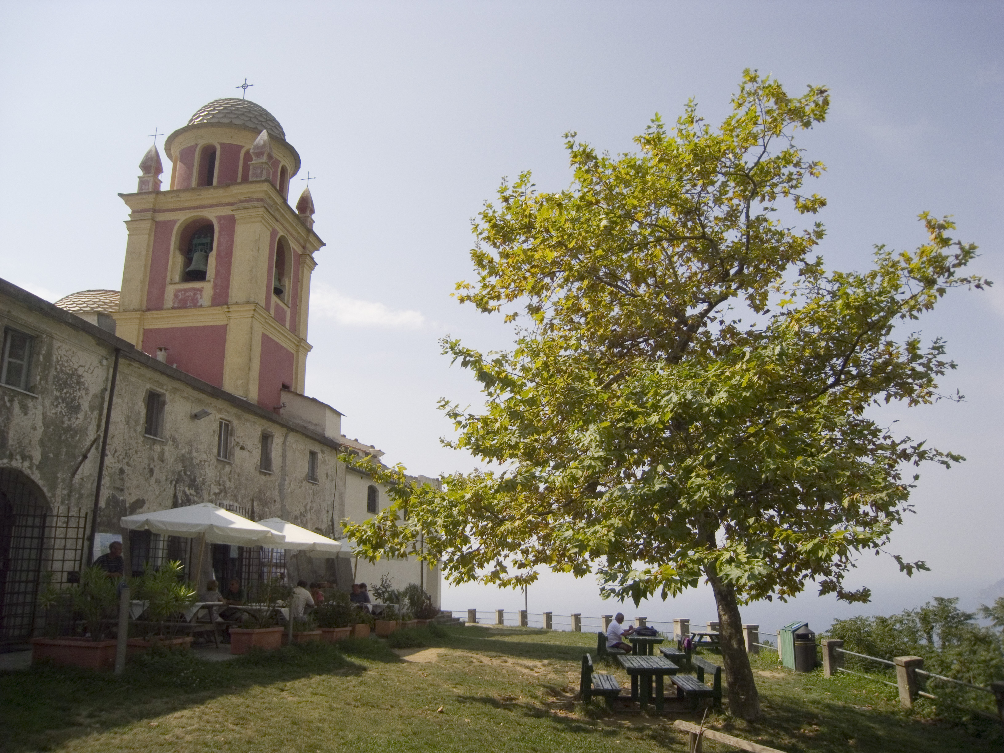 Plutôt sympa comme coin pour casser la croûte.